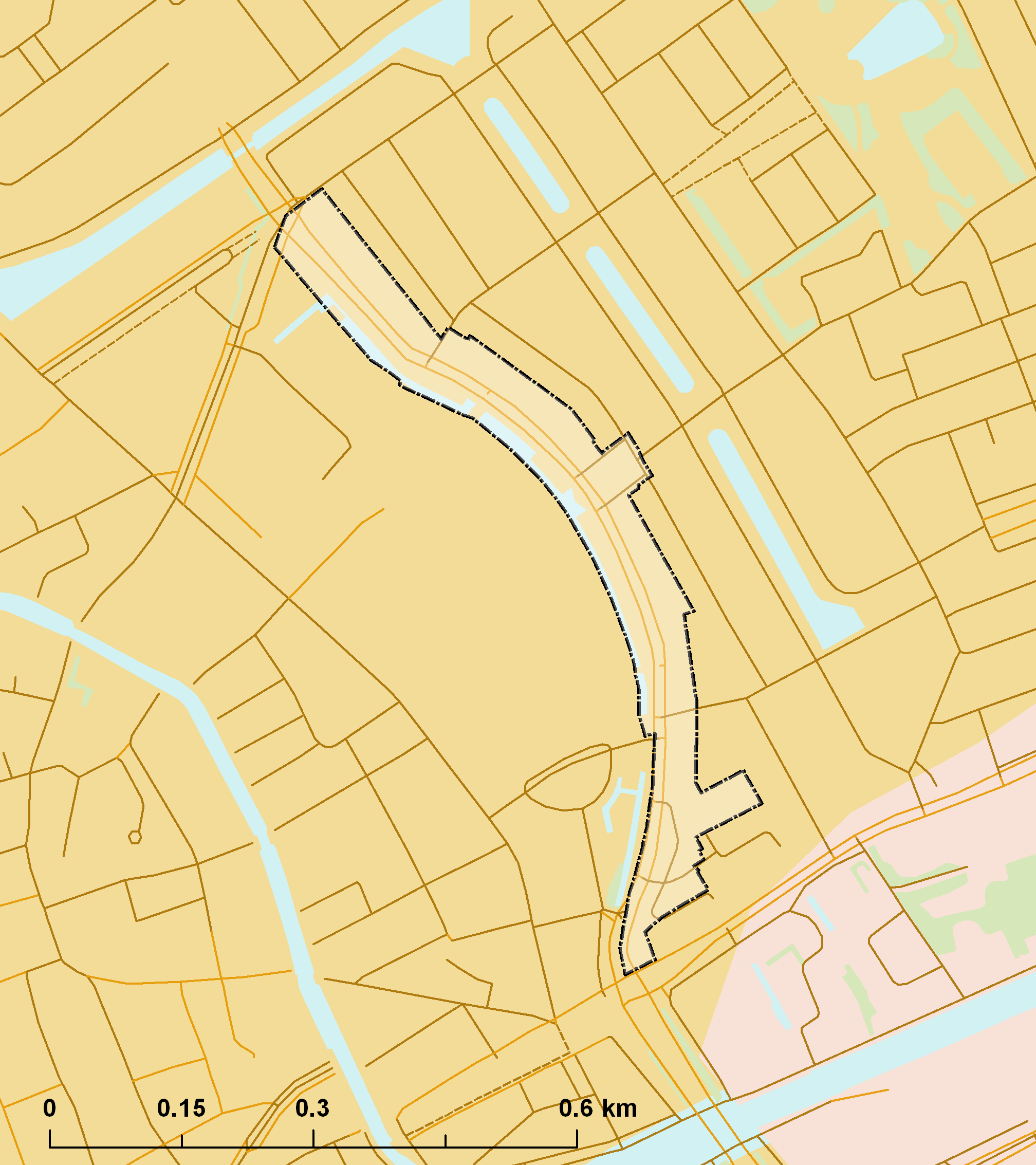 Rijksbeschermd stads- of dorpsgezicht - Groningen - Petrus Campersingel.png